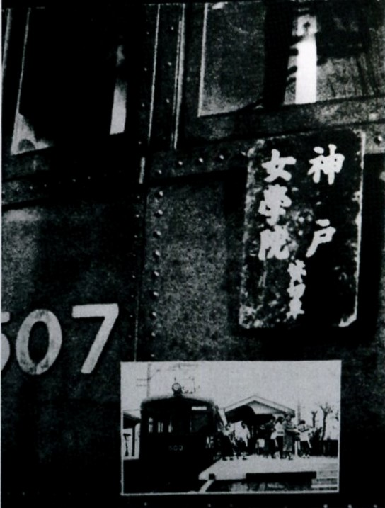 阪急の神戸女学院貸切車。下は1936年(昭和11年)の阪急今津線門戸厄神駅ホーム。『神戸女学院の125年』(2000年)より転載したもの。 [1]